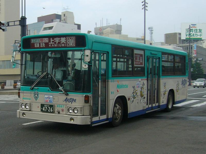 登録番号：福岡22か47-26 西日本鉄道宇美自動車営業所所属 carno.4597